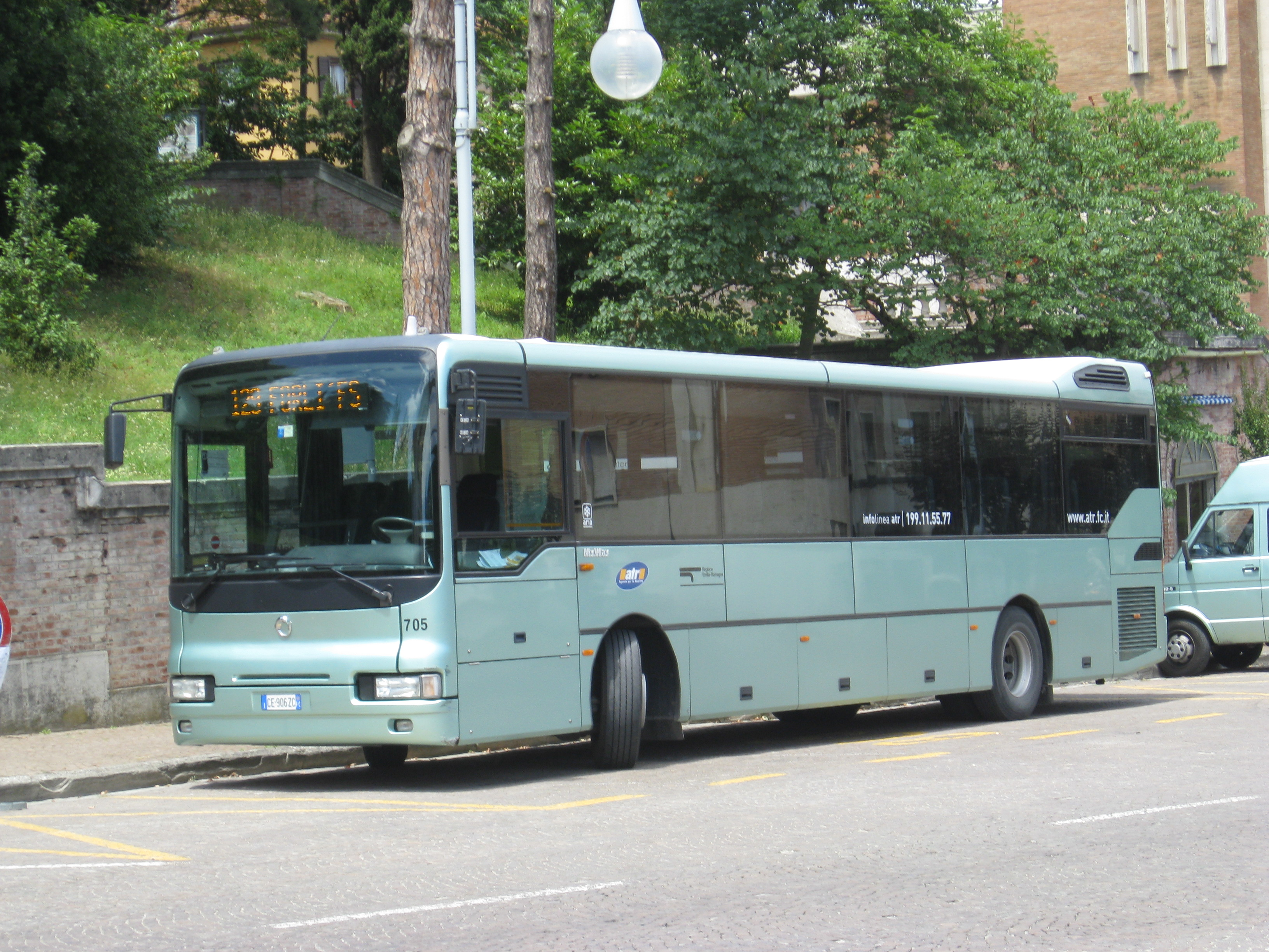 Autobus della linea 129 in arrivo a Predappio, foto propria